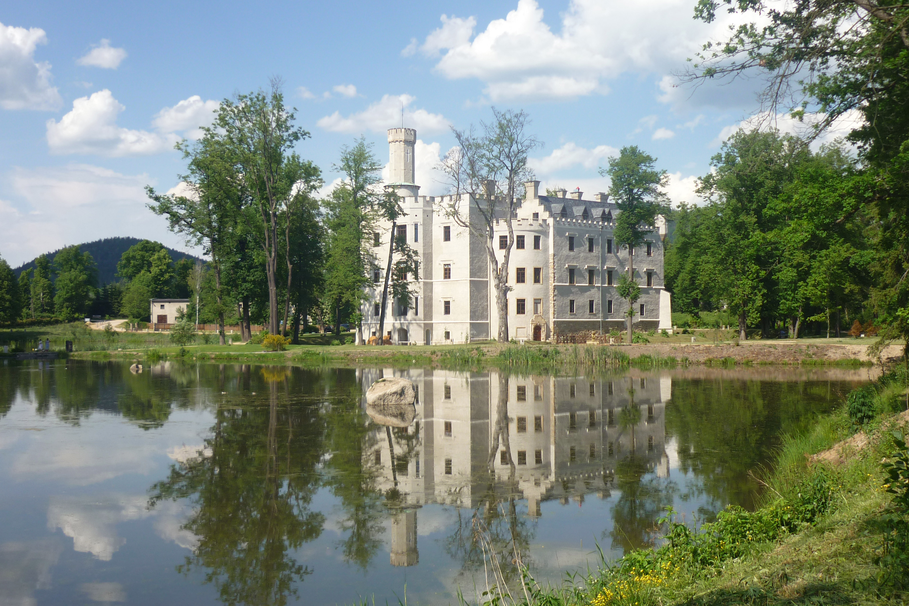 Schloss Fischbach (Karpniki) im Riesengebirge